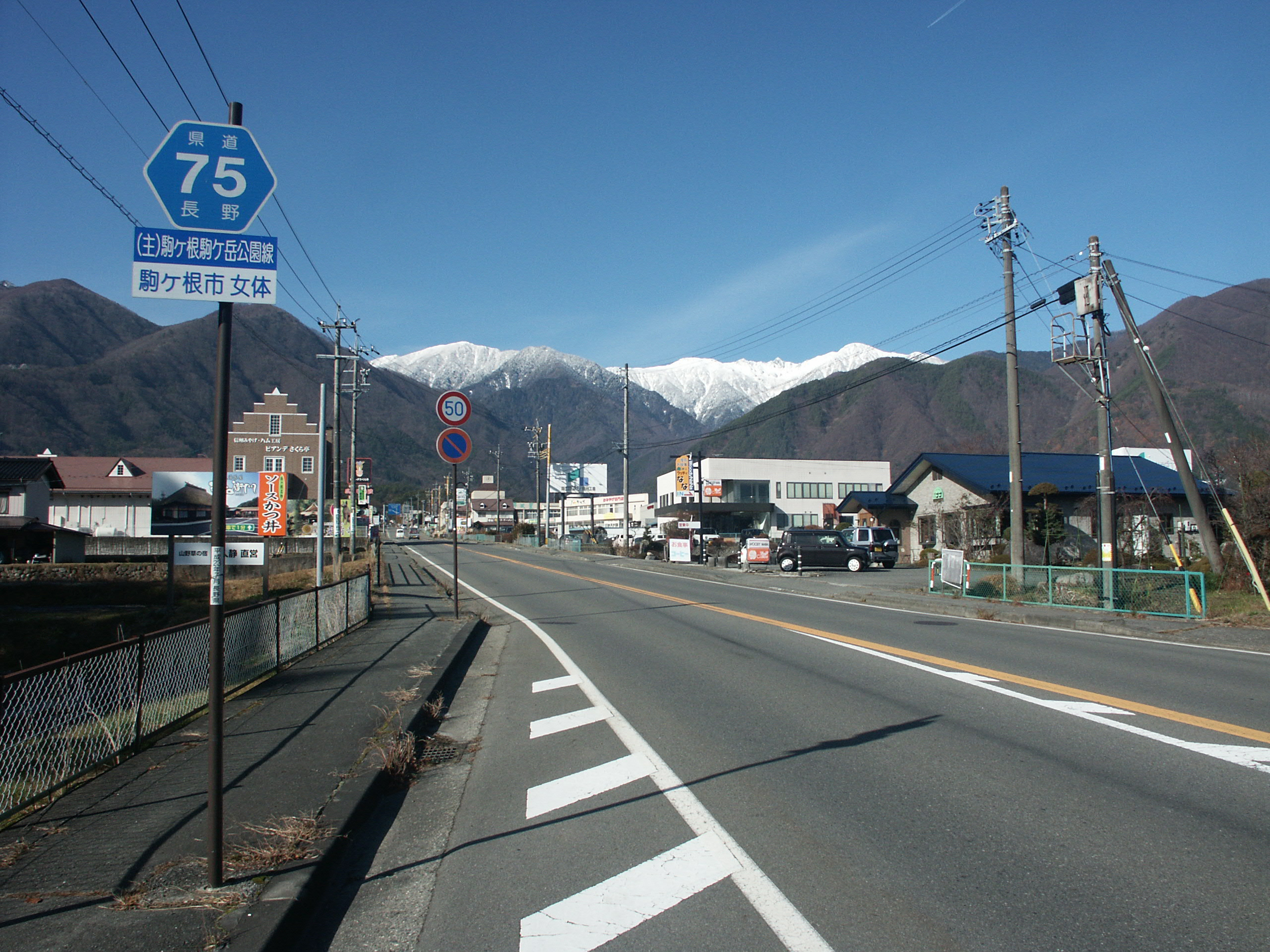 長野県道75号線駒ヶ根市女体付近